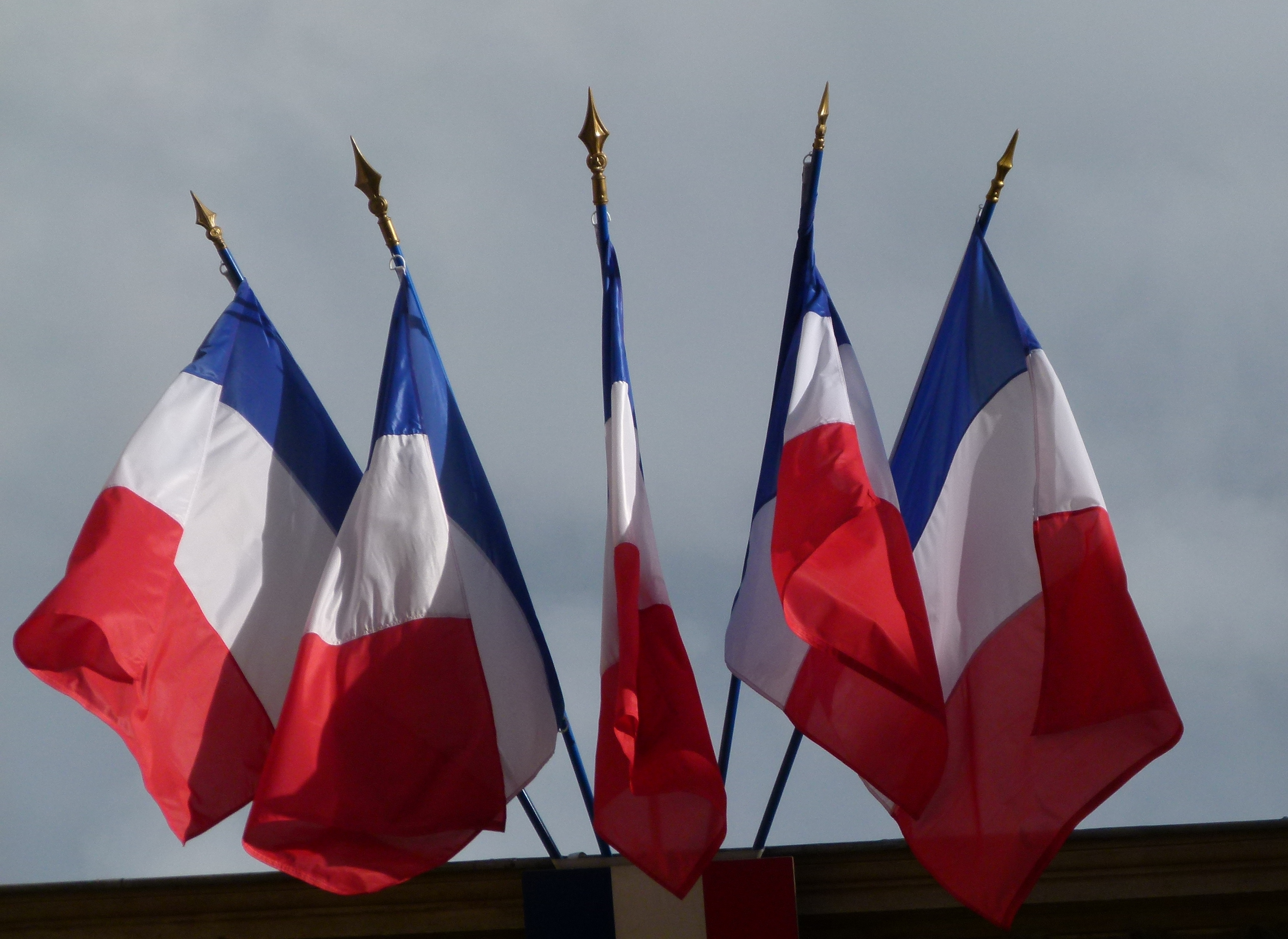 Sénat